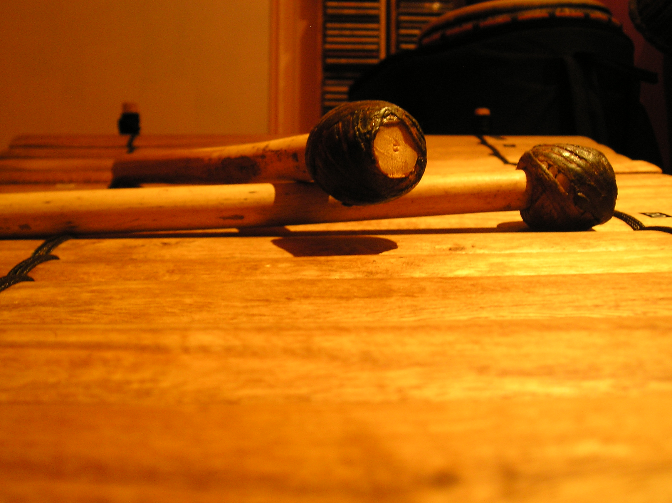 Drum sticks